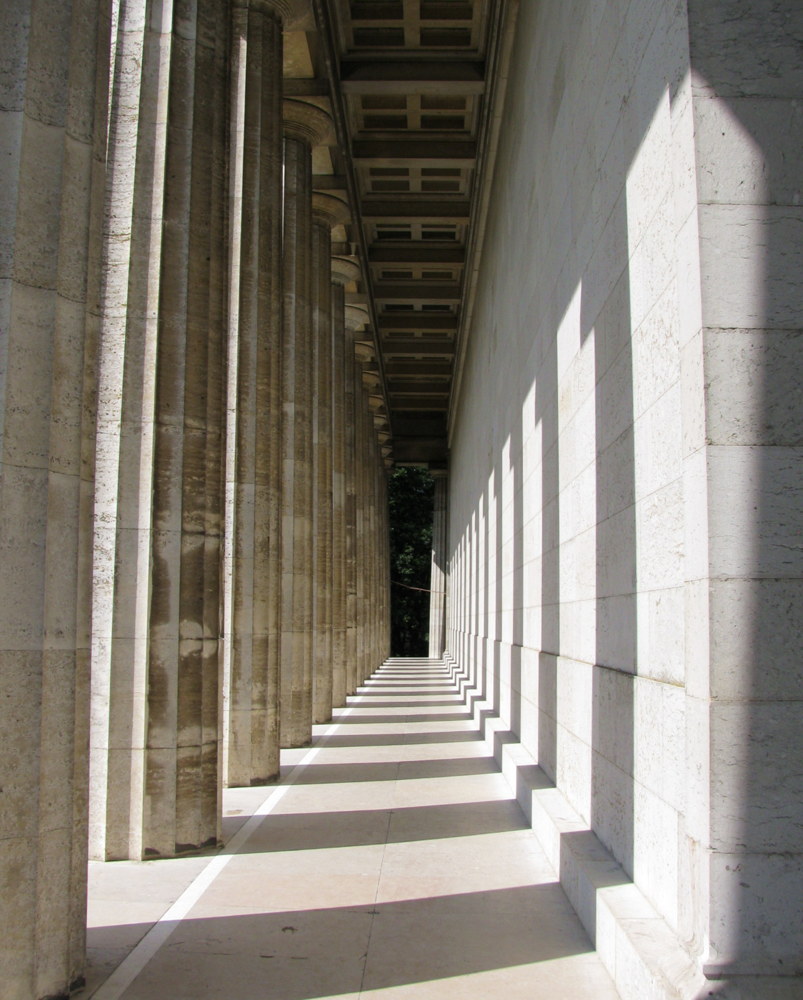 Säulengang entlang des Walhalla-Tempels